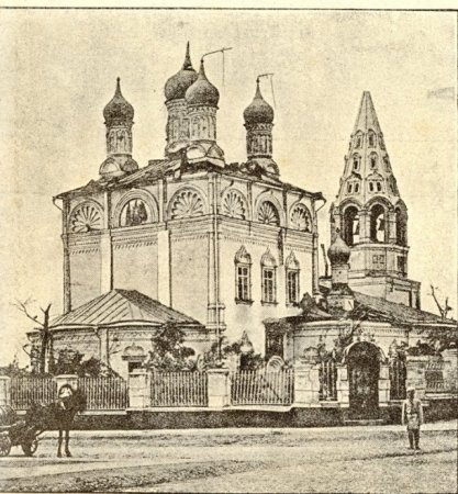 Hurricane of June 16, 1904. The damaged church of Peter and Paul in Lefortovo, Moscow/Ураган 16 июня 1904 г. Повреждённая ураганом церковь Петра и Павла, в Лефортове.